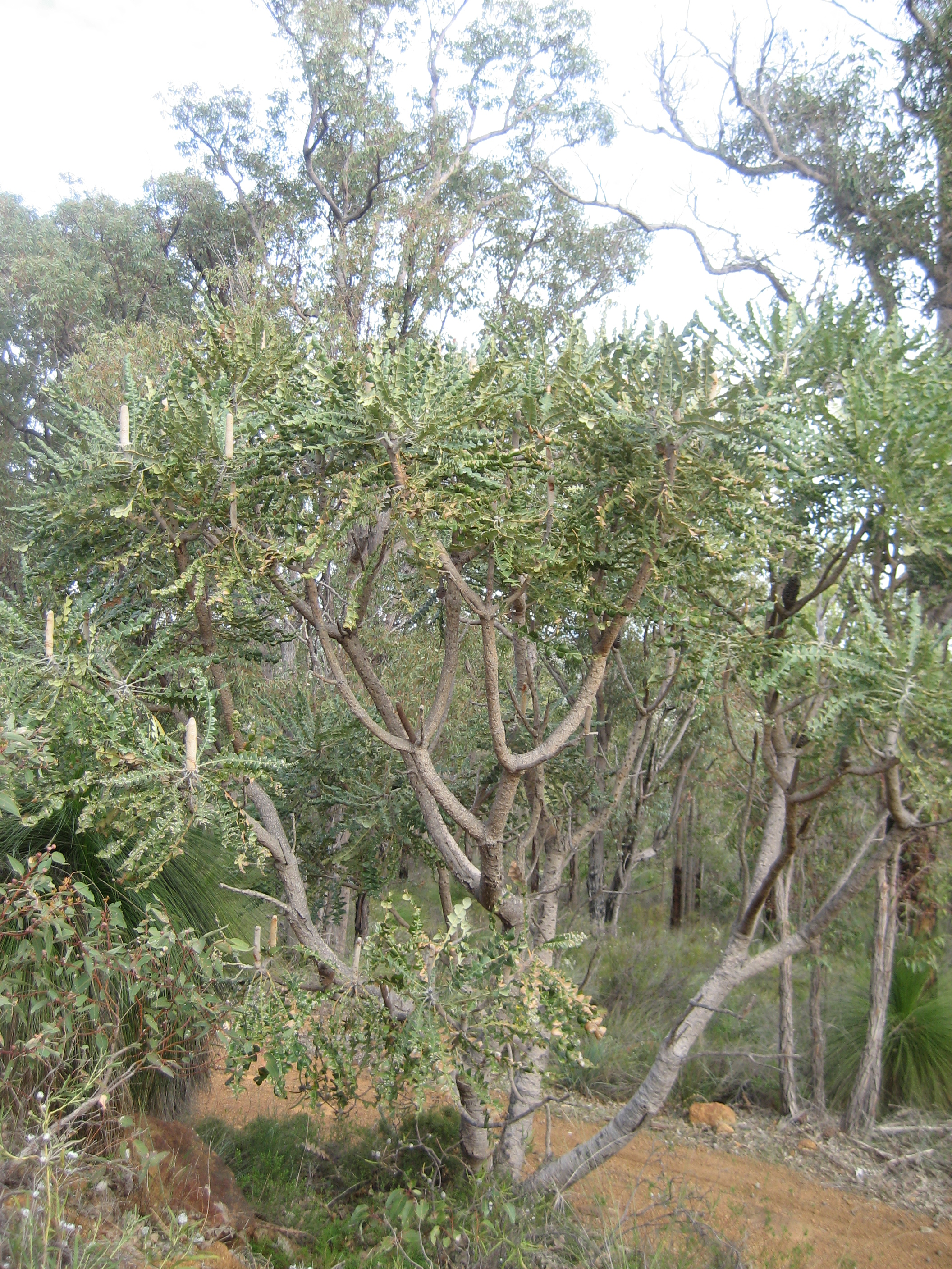 Banksia grandis